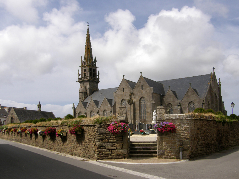 Eglise St-Arzel de Plouarzel